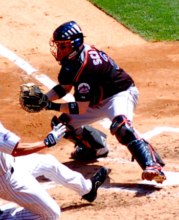 Brian Schneider